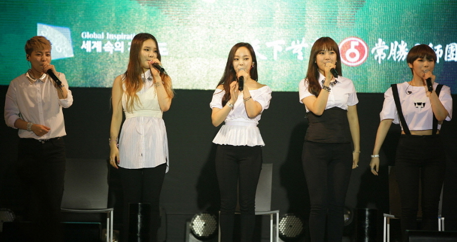 어썸베이비 한마음 위문공연 CBS 러빙유 콘서트